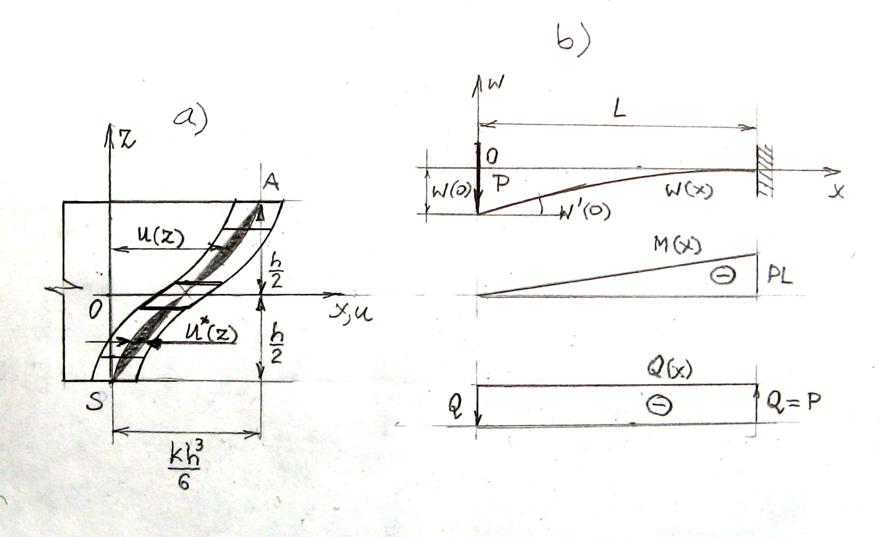 Ścinanie przekroju